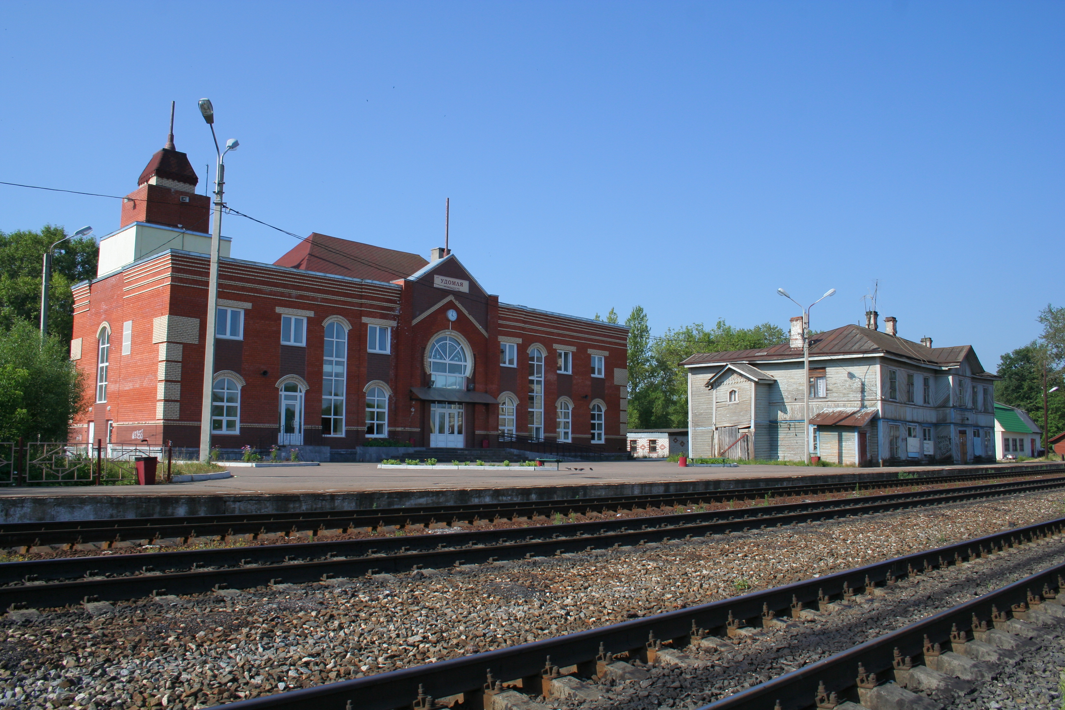 Stadt Udomlja (Oblast Twer, Russland). Der Bahnhof.